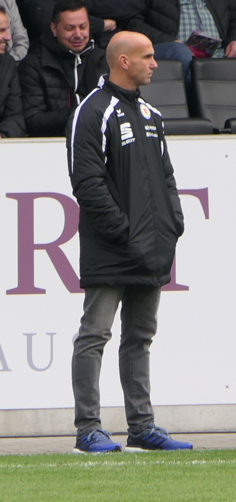 Der Fussballtrainer Andre Schubert an der Seitenlinie bei Eintracht Braunschweig 2018, beim Auswärtsspiel bei der SG Sonnenhof Großaspach.